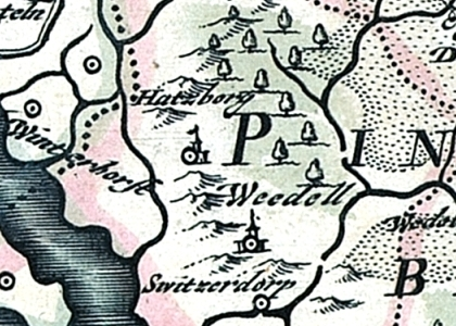 Die Hatzburg, Ausschnitt aus der "Landtcarte des Fürstenthumbe Stormarn" von Johannes Mejer (* 1606 Husum; † 1674 Husum) aus dem Jahr 1650 Landtcarte von dem Fürstenthumbe Stormarn Anno 1650